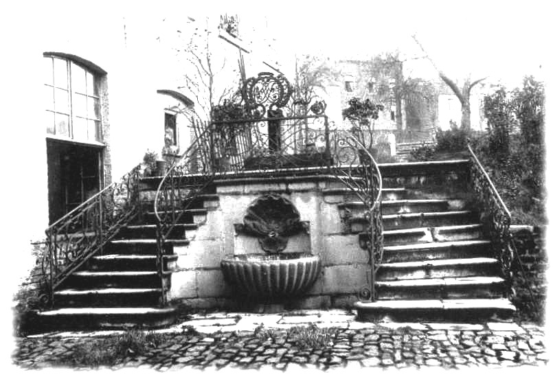 Die Gartentreppe am Haus der Familie Guaita in der Rosstrasse 46-48, vor dem Abriss 1905